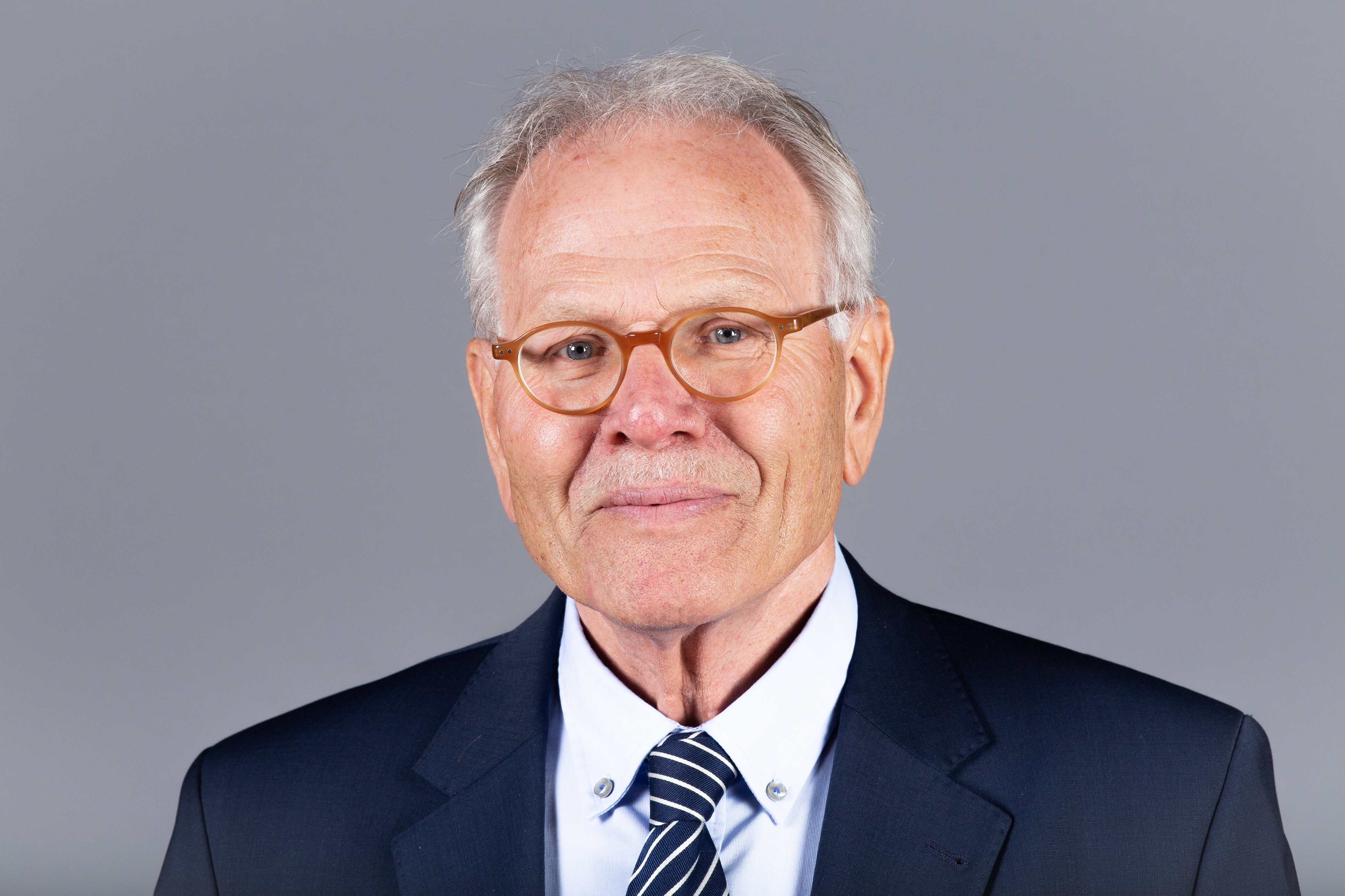 Abgeordnete(r) der Bürgerschaft der Freien und Hansestadt Hamburg Wolfhard Ploog